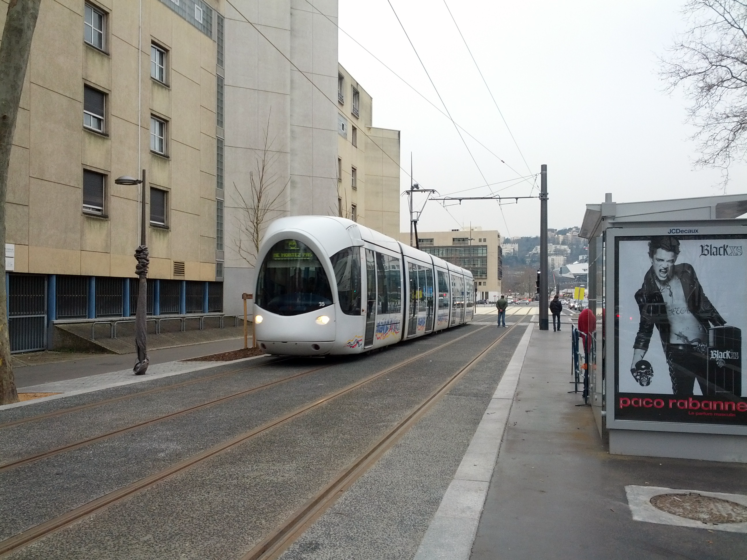 Rame Citadis 302 du tramway de Lyon en essais sur le prolongement de la ligne T1 vers Debourg.